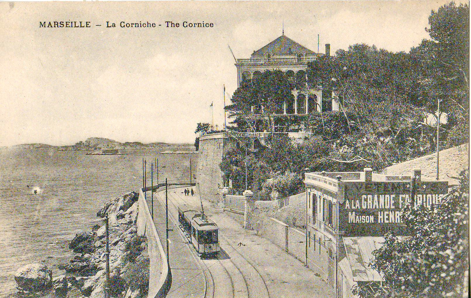 Carte postale sans mention d'éditeur : Marseille - La Corniche